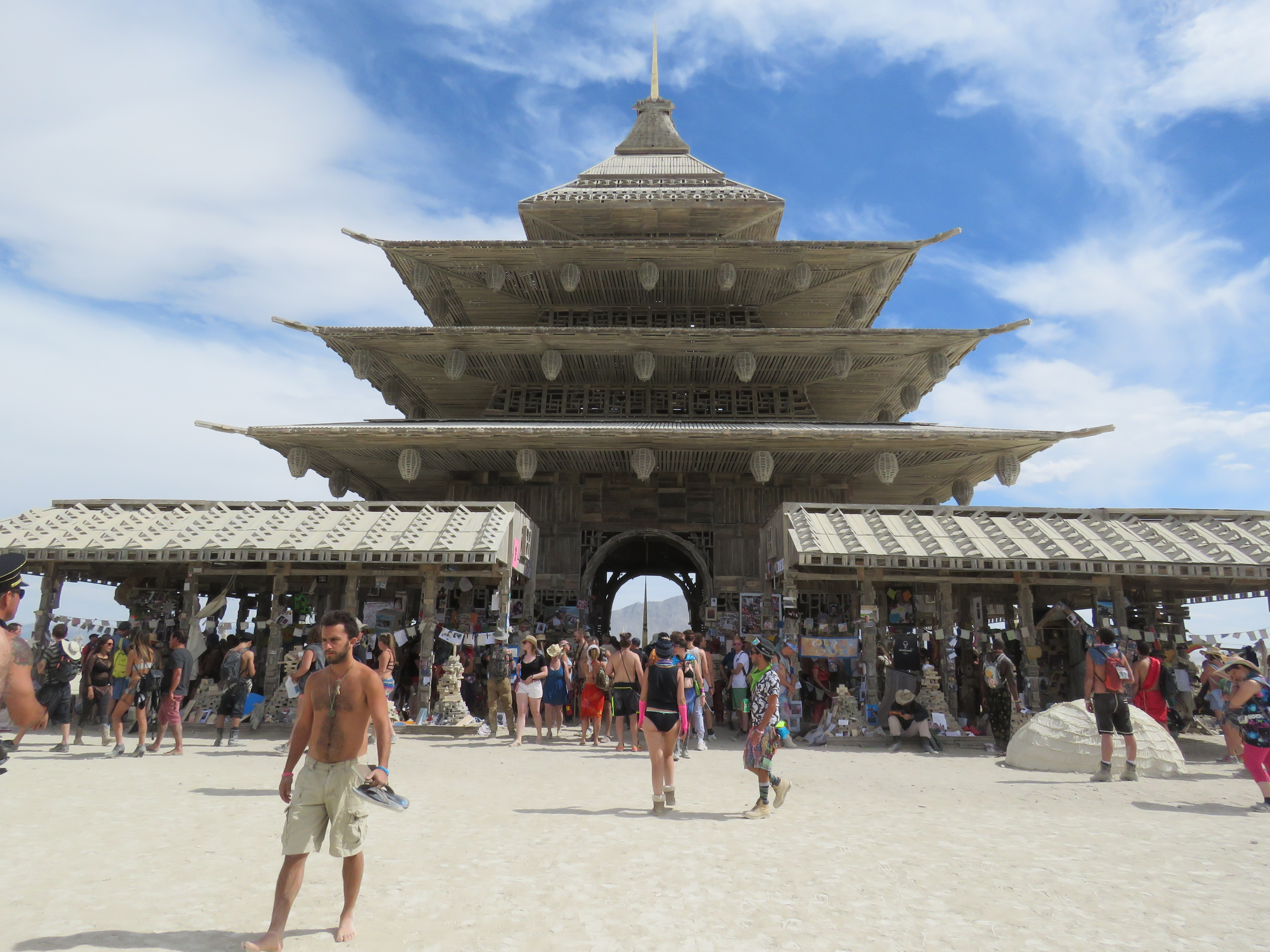 Burning Man 2016 Daytime 188